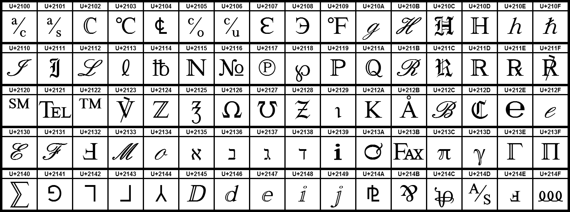 Grafiktafel für den Unicodeblock Buchstabenähnliche Symbole.